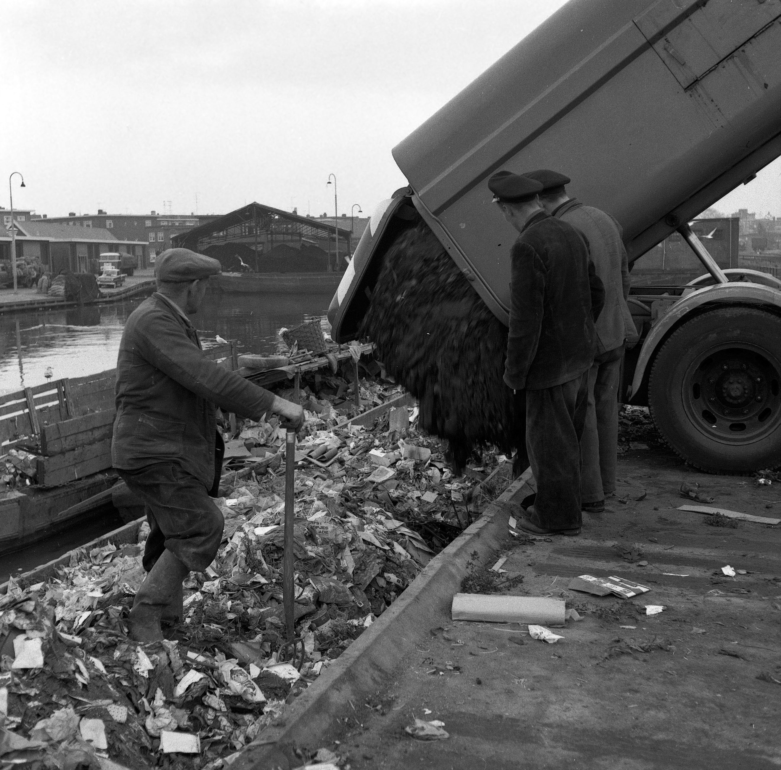 Storten van huisvuil in schip in Utrecht, Nederland